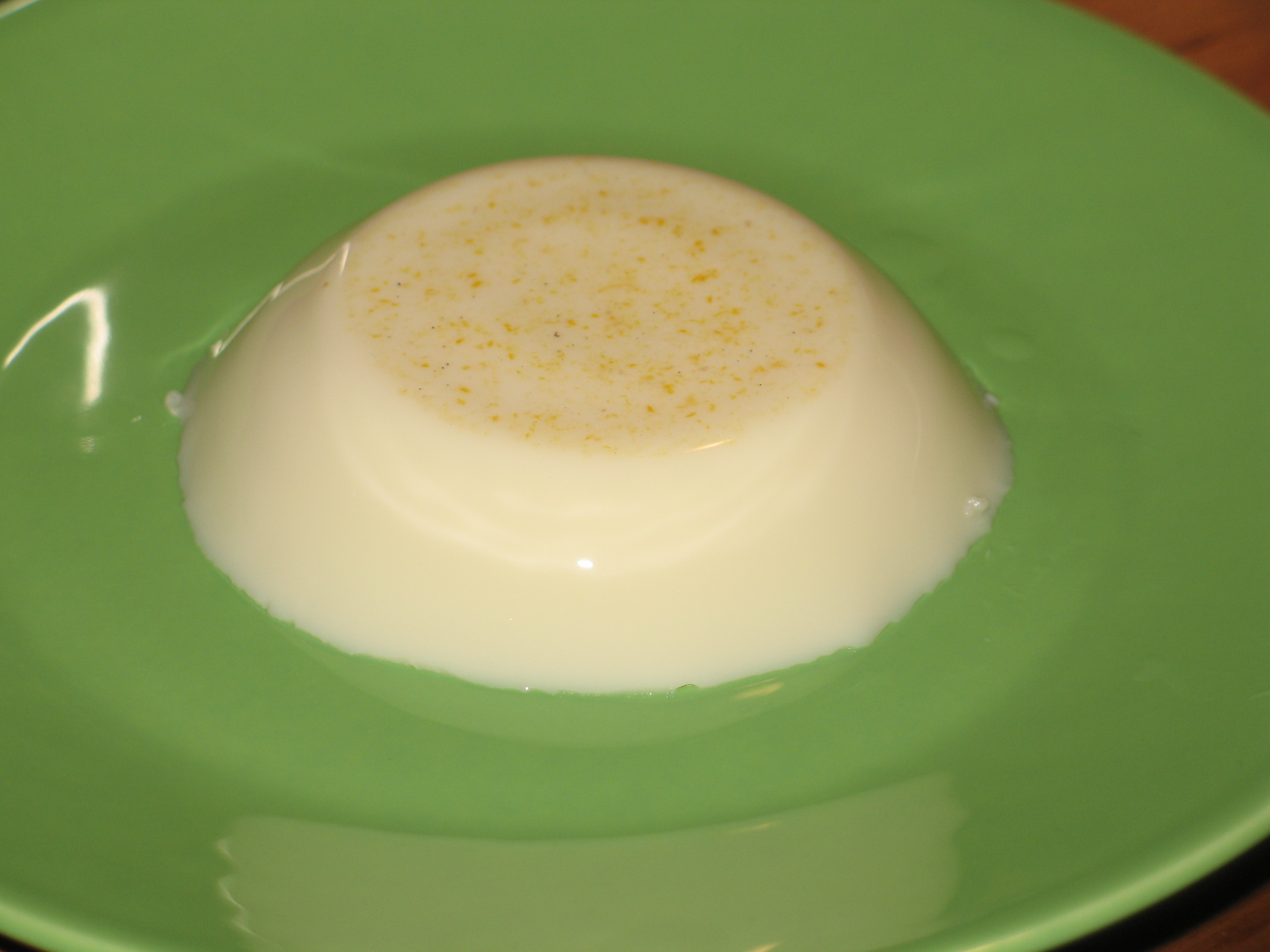 Molded blancmange dessert on a green plate.